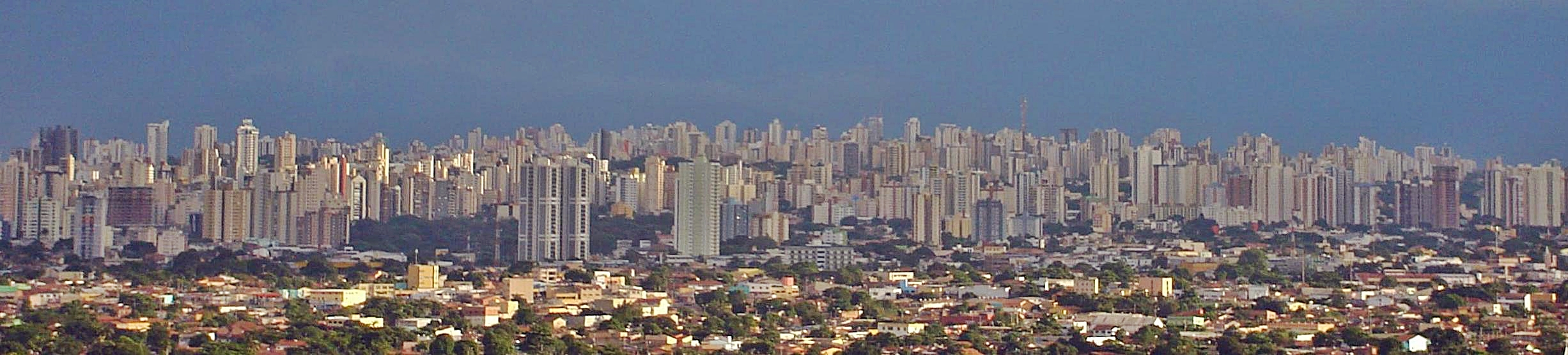 Skyline_Goiânia-GO, Brazil